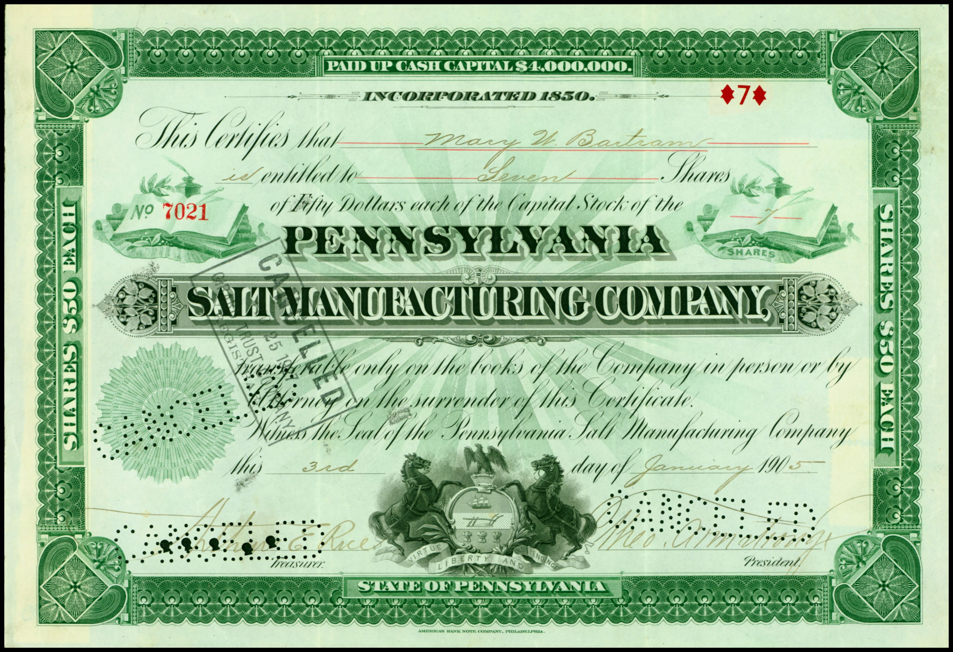 Aktie der Pennsylvania Salt Manufacturing Company von 1905; aus dem Fundus des Ersten Deutschen Historic-Actien-Museum e.V. (EDHAM), Kürnbach